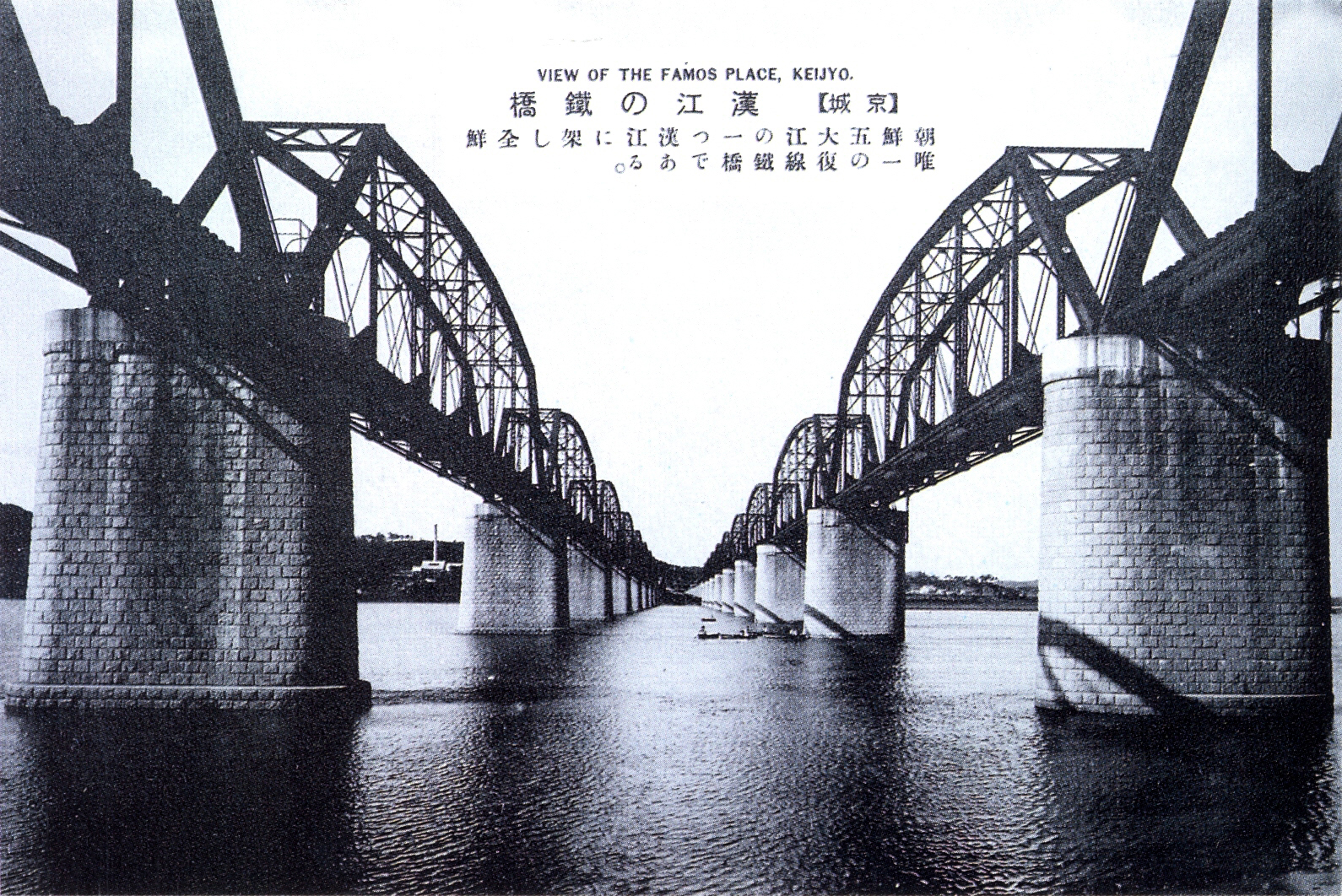 1930년경의 한강철교